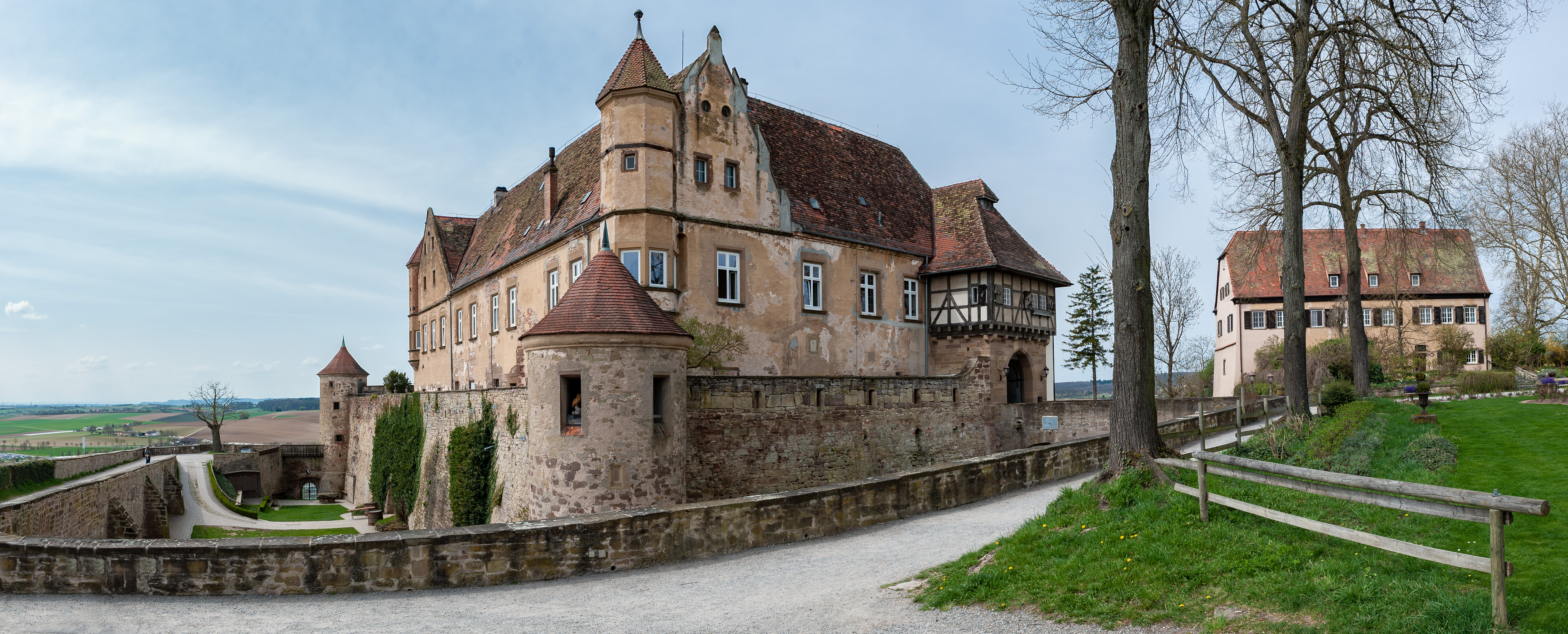 Burg Stettenfels bei Untergruppenbach, Baden-Württemberg